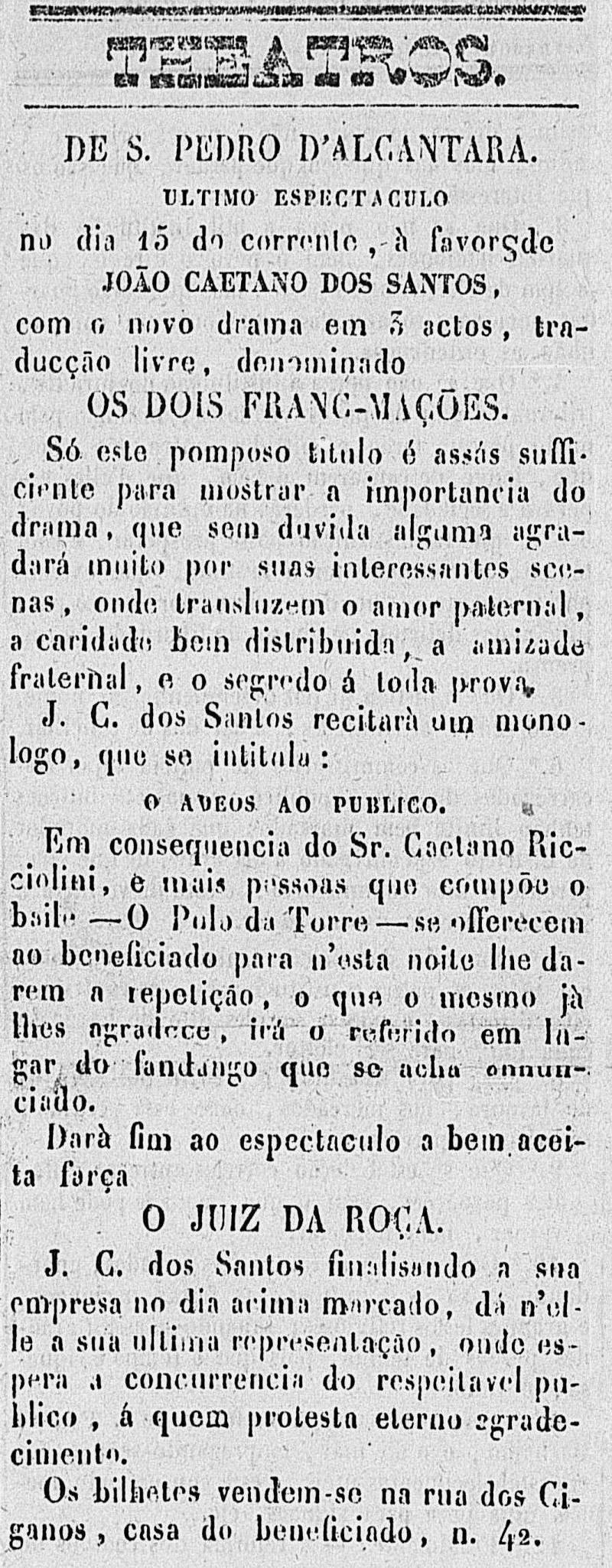 Anúncio de espetáculo de despedida a João Caetano, em 15 de outubro de 1838, que contou com a participação de Caetano Ricciolini.